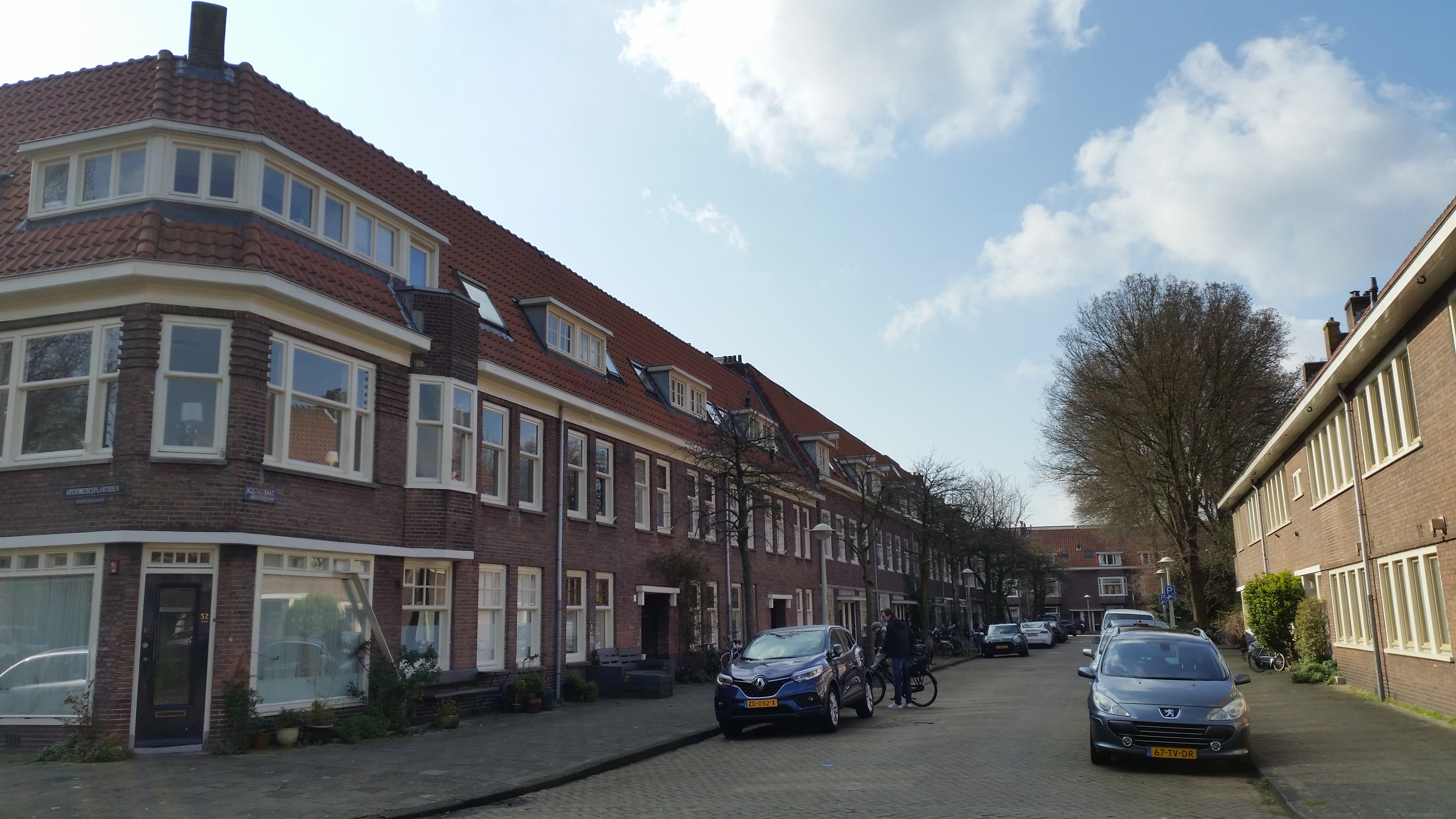 De Voltastraat, Amsterdam-Oost in maart 2020